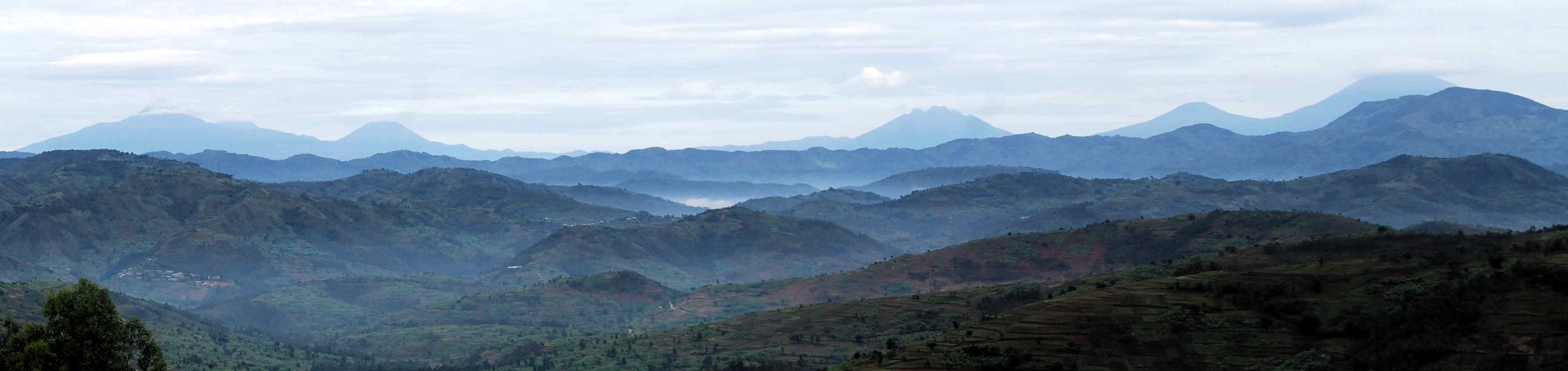 Vista dels volcans Virunga, dels muntanyes de Ruli a Rwanda. Sis de les volcans Virunga son visibles a l'horitzó (de esquerre i a dret): Karisimbi, Mikeno (darrere Karisimbi), Bisoke, Sabyinyo, Mgahinga i Muhabura.